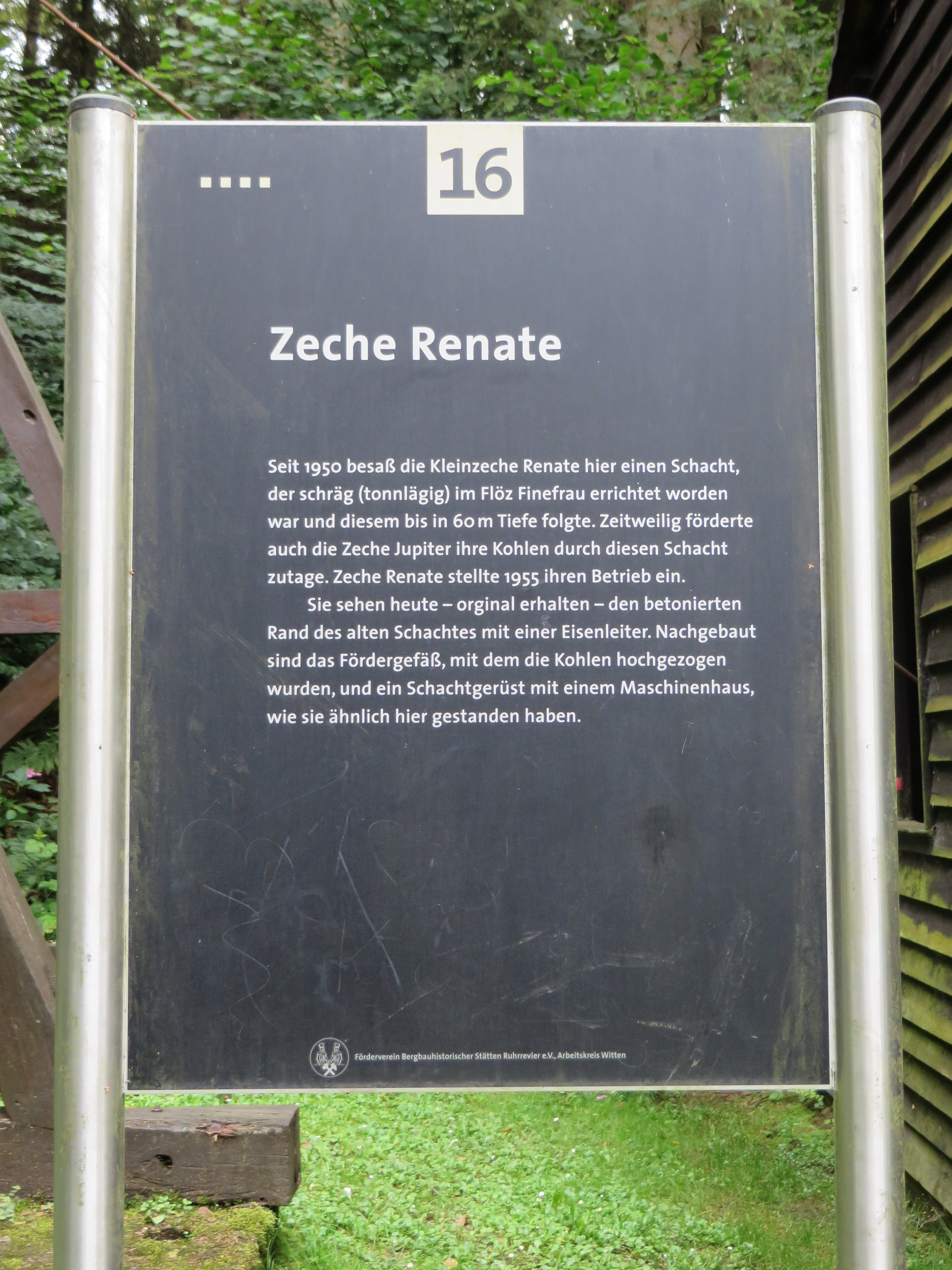 Infotafel Zeche Renate auf dem Bergbauwanderweg Muttental